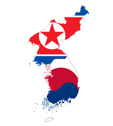 Imágen de la superficie geográfica de la península de Corea con sus banderas políticas